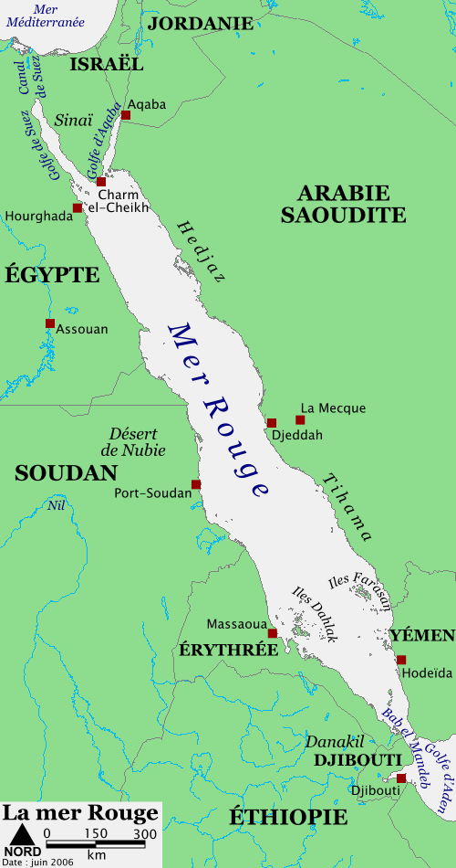 Carte de la mer Rouge. La mer Rouge est une mer délimitée à l'ouest par l'Afrique et à l'est par la péninsule arabique, elle communique au sud avec le golfe d'Aden par le détroit de Bab el Mandeb et au nord avec la Méditerranée par le canal de Suez.